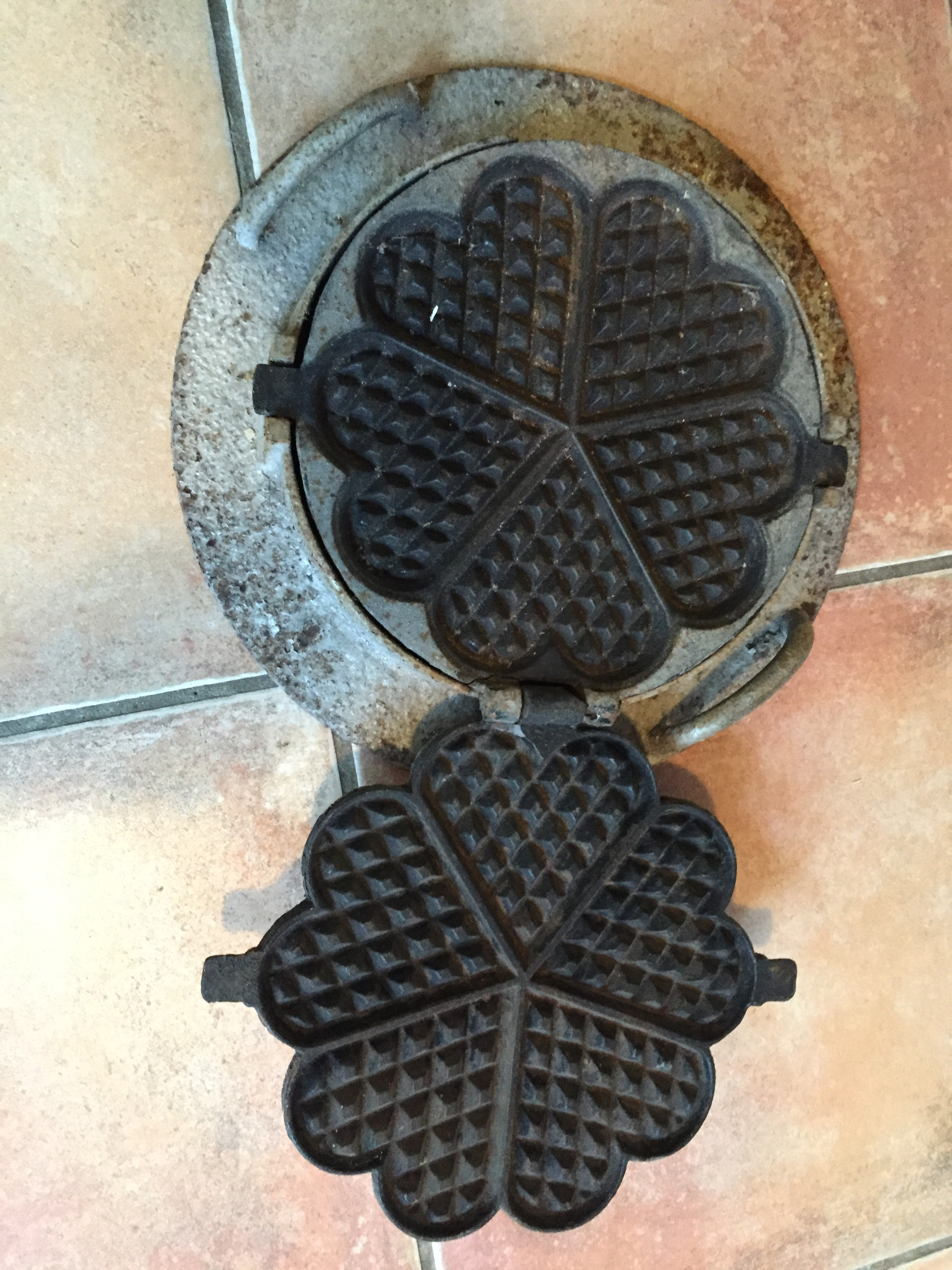 Waffeleinsatz Stangenofen